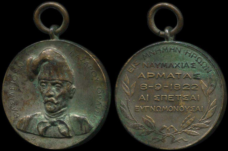 Μετάλλιο του 1922 για τα 100 χρόνια της ναυμαχίας των Σπετσών 8-9-1822. Όψη: "ΒΑΣΙΛΕΙΟΣ Ν ΛΑΖΑΡΟΥ ΟΡΛΩΦ". Πίσω πλευρά: "ΕΙΣ ΜΝΗΜΗΝ ΗΡΩΩΝ ΝΑΥΜΑΧΙΑΣ ΑΡΜΑΤΑΣ,8-9-1922/ ΑΙ ΣΠΕΤΣΑΙ ΕΥΓΝΩΜΟΝΟΥΣΑΙ." Βάρος 26gr και διάμετρος 36mm